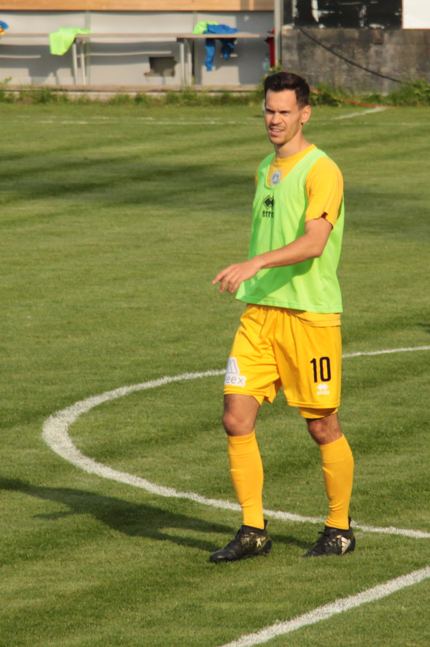 Marcel Toth beim Spiel Wiener Sportklub gegen First Vienna FC in der Halbzeitpause beim Aufwärmen.